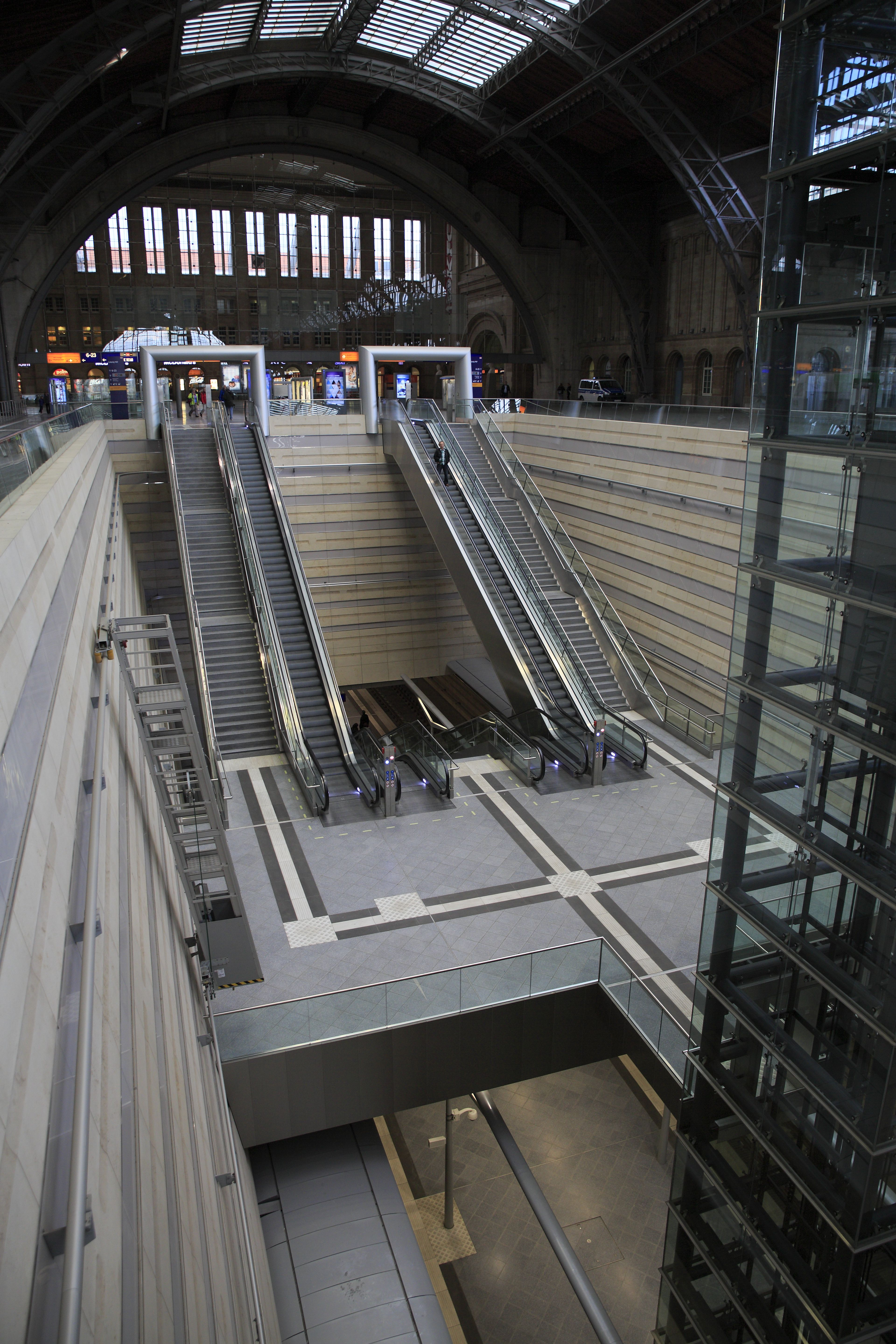 In der westlichen Bahnsteighalle etwa in der Lage der Gleise 3 bis 5. Die Wege vom Querbahnsteig sind weit, am weitesten sind die zum Aufzug. Wer schlecht laufen kann, ist nach Meinung der Auftraggeber wohl selber schuld.